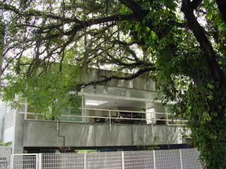 Fachada da casa Gerassi construída por Paulo Mendes da Rocha em São Paulo. a foto foi tirada com uma camera digital